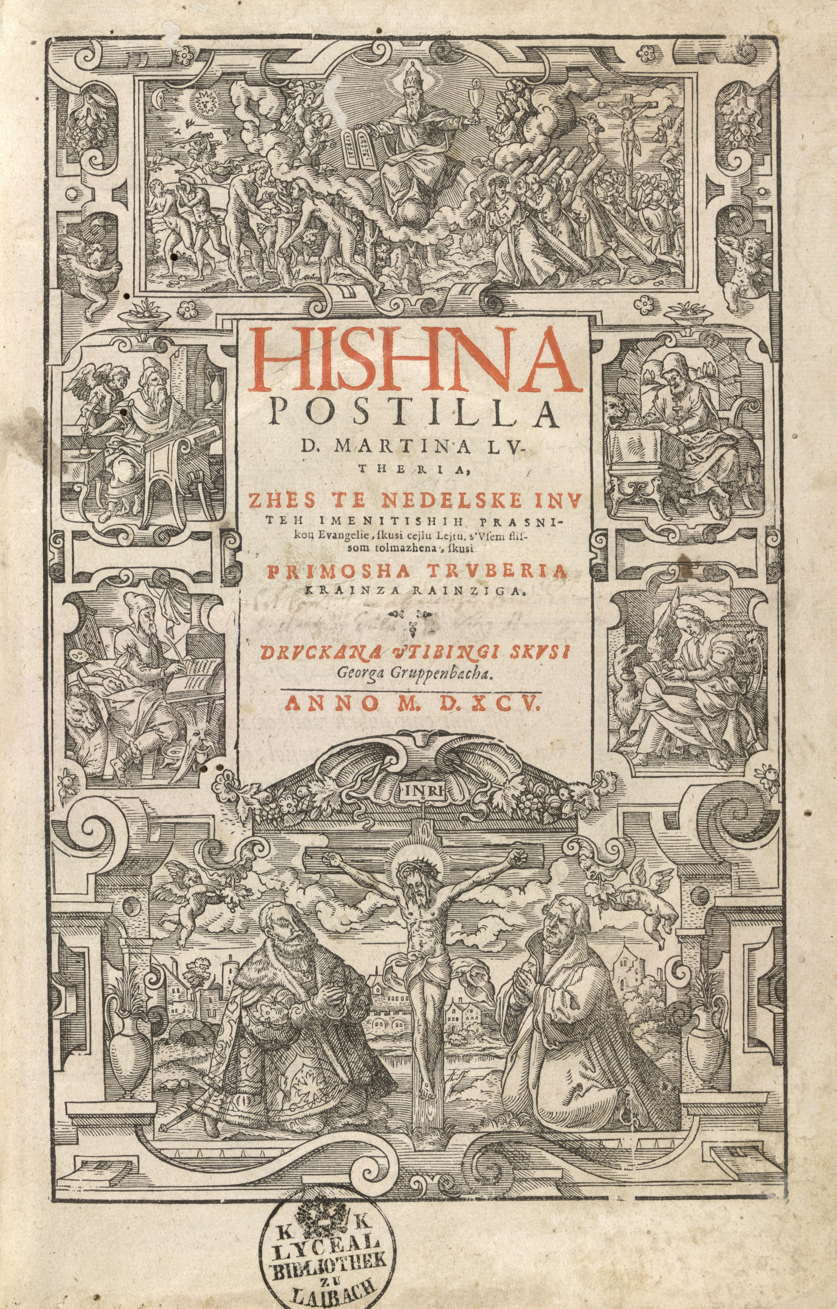 Naslovnica knjige Hišna Postila.